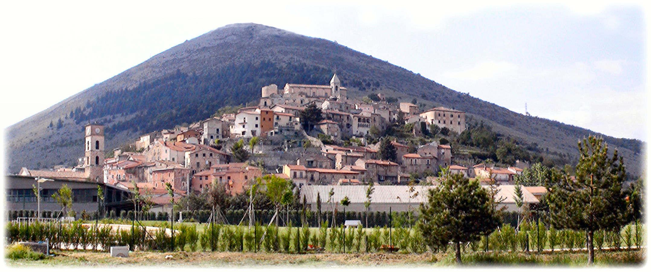 Panoramica di Scurcola Marsicana.